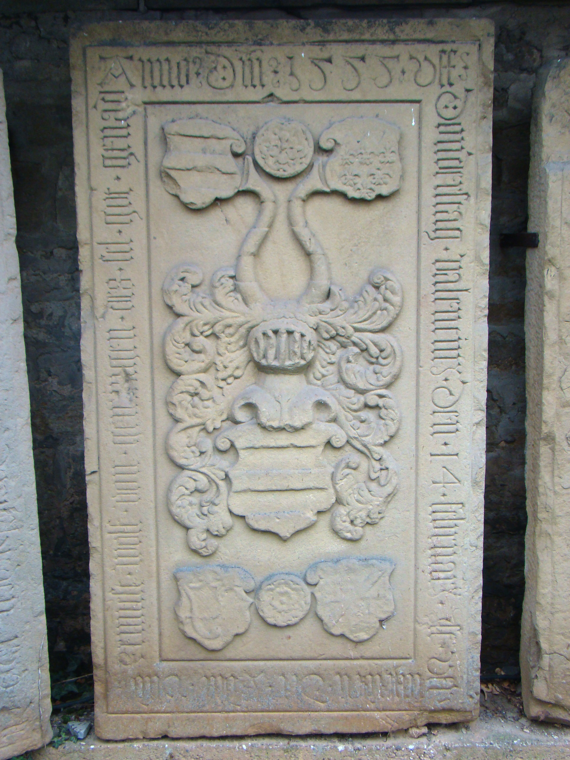 Historische Grabmale beim Unterschloss Gemmingen: Wolf von Gemmingen († 1555)